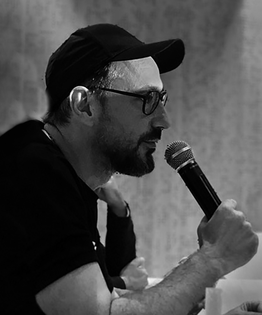 폰스 히크만, 중국 항저우 디자인 썸머 컨퍼런스 2019 Fons Hickmann at Design Summer Conference Hangzhou China 2019